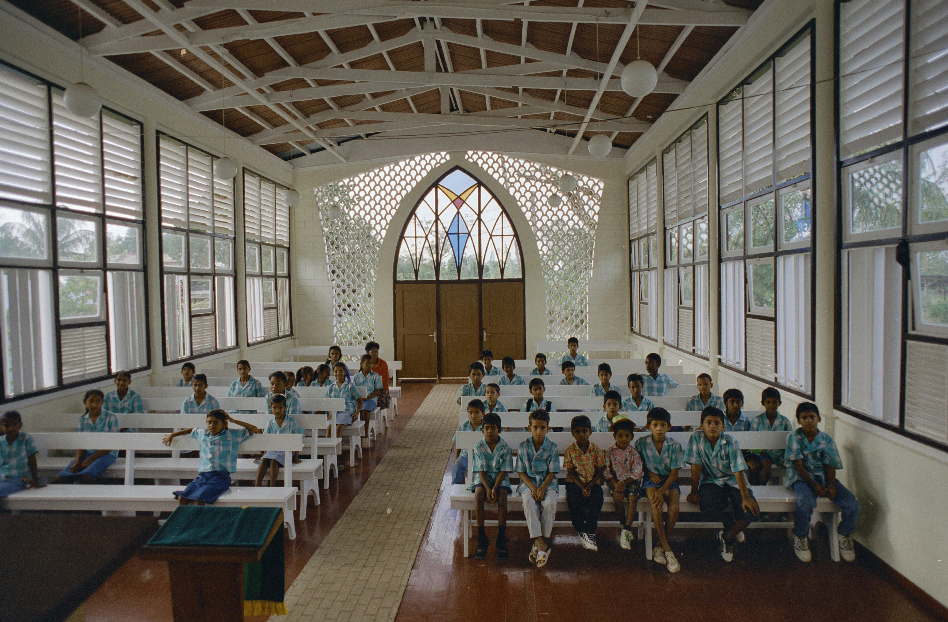 Koloniale geschiedenis/ Kerken: Interieur, overzicht kerk naar de uitgang op het terrein van de Evangelische Broeder Gemeente Suriname te Alkmaar (opmerking: Suriname Reis Loek Tangel)